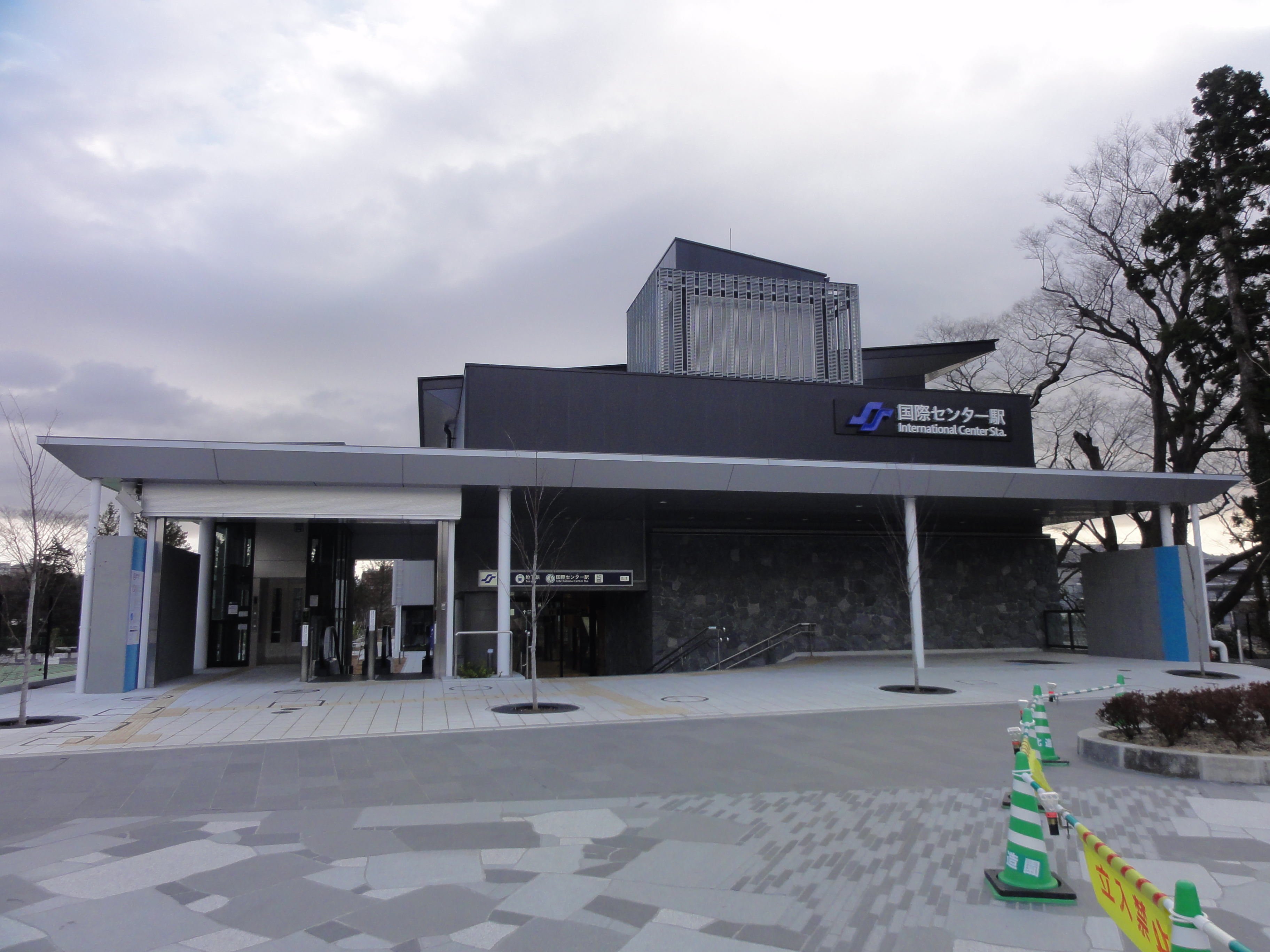 国際センター駅西1出入口